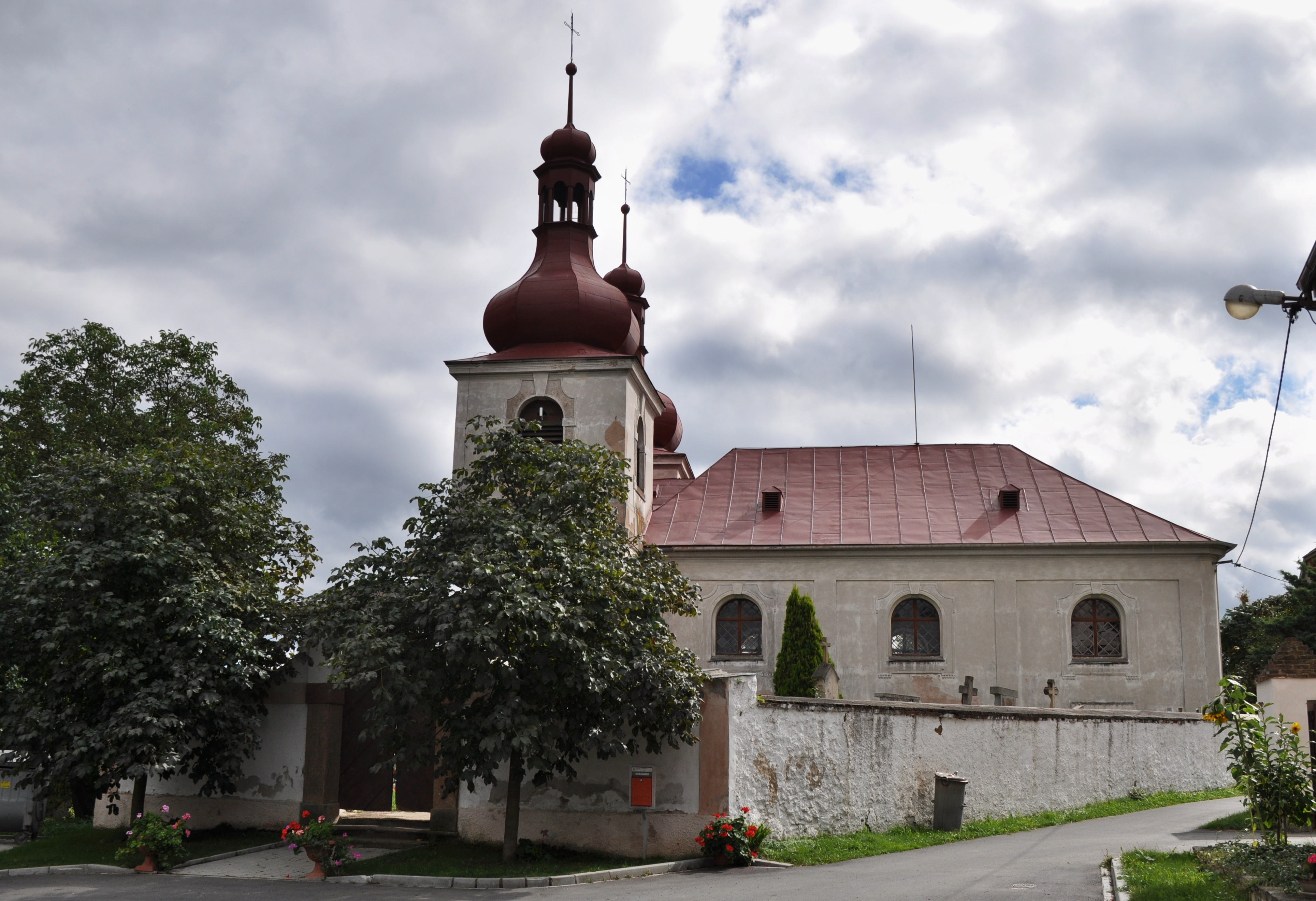 Kostel sv.Martina Strážiště